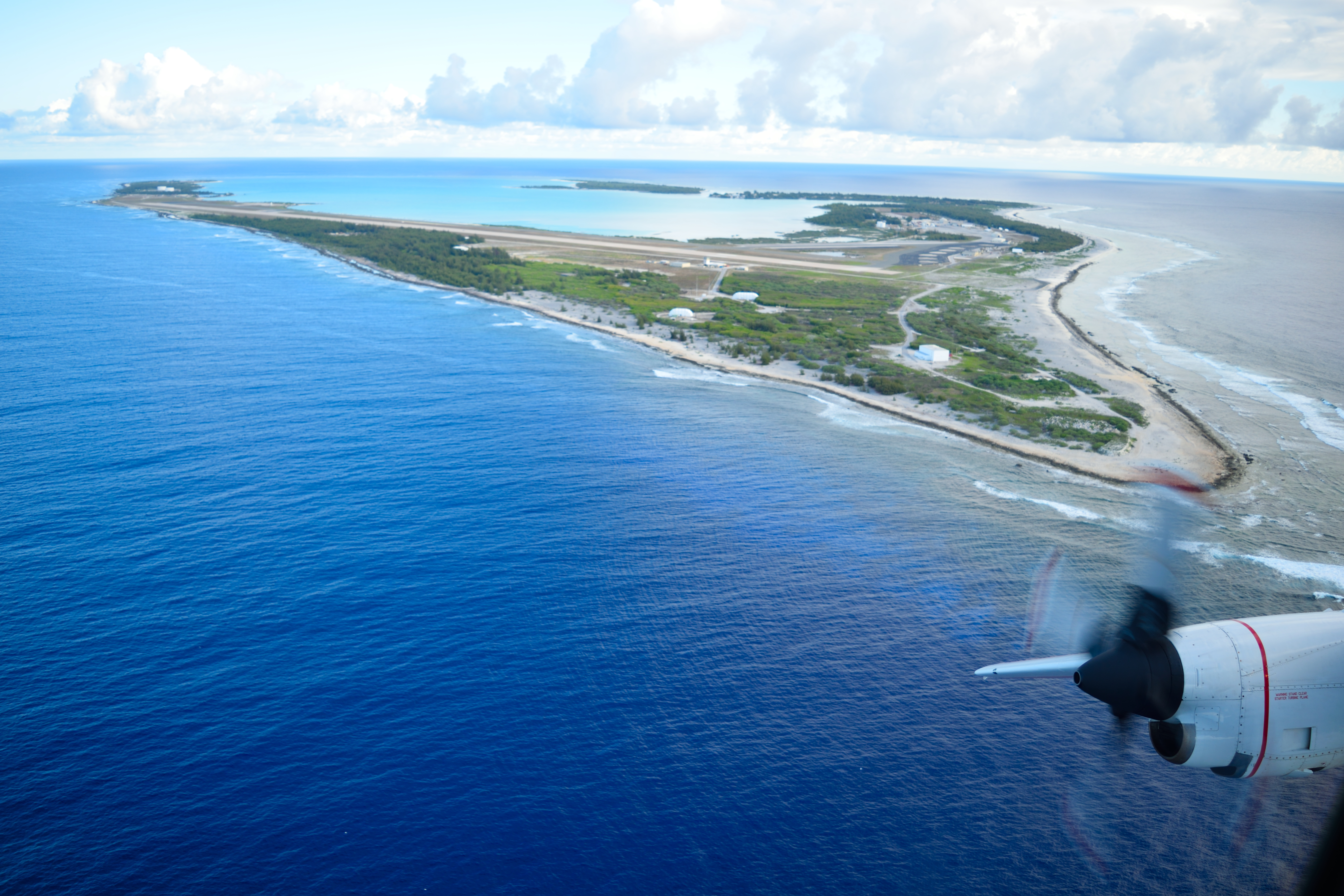 Entire atoll